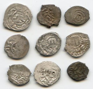 Kırım Hanlığı, Osmanlı Devleti'ne bağlı olsa da Kırım hanlarının kendi topraklarında hükümdarlık alameti olarka tarak damgalı para bastırma ve camilerde kendi adlarıyla hutbe okutma hakları vardı.